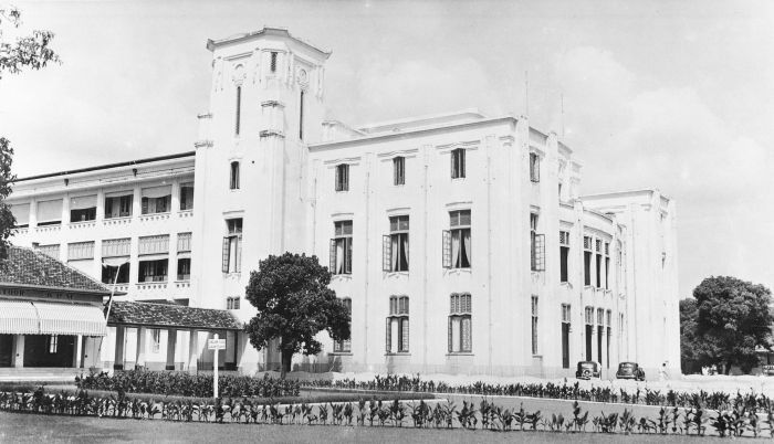 Repronegatief. Het in 1916 gebouwde hoofdkantoor van de koninklijke Paketvaart Maatschappij aan Koningsplein-Oost (KPM).